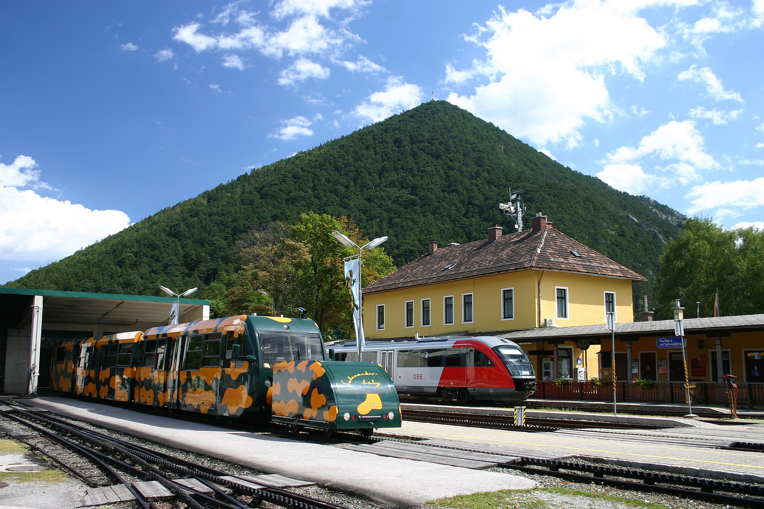 Puchberg am Schneeberg Bahnhof mit Salamander-Triebwagen der Zahnradbahn und Desiro-Triebwagen der Normalspurstrecke. Im Hintergrund der Himberg (948m).